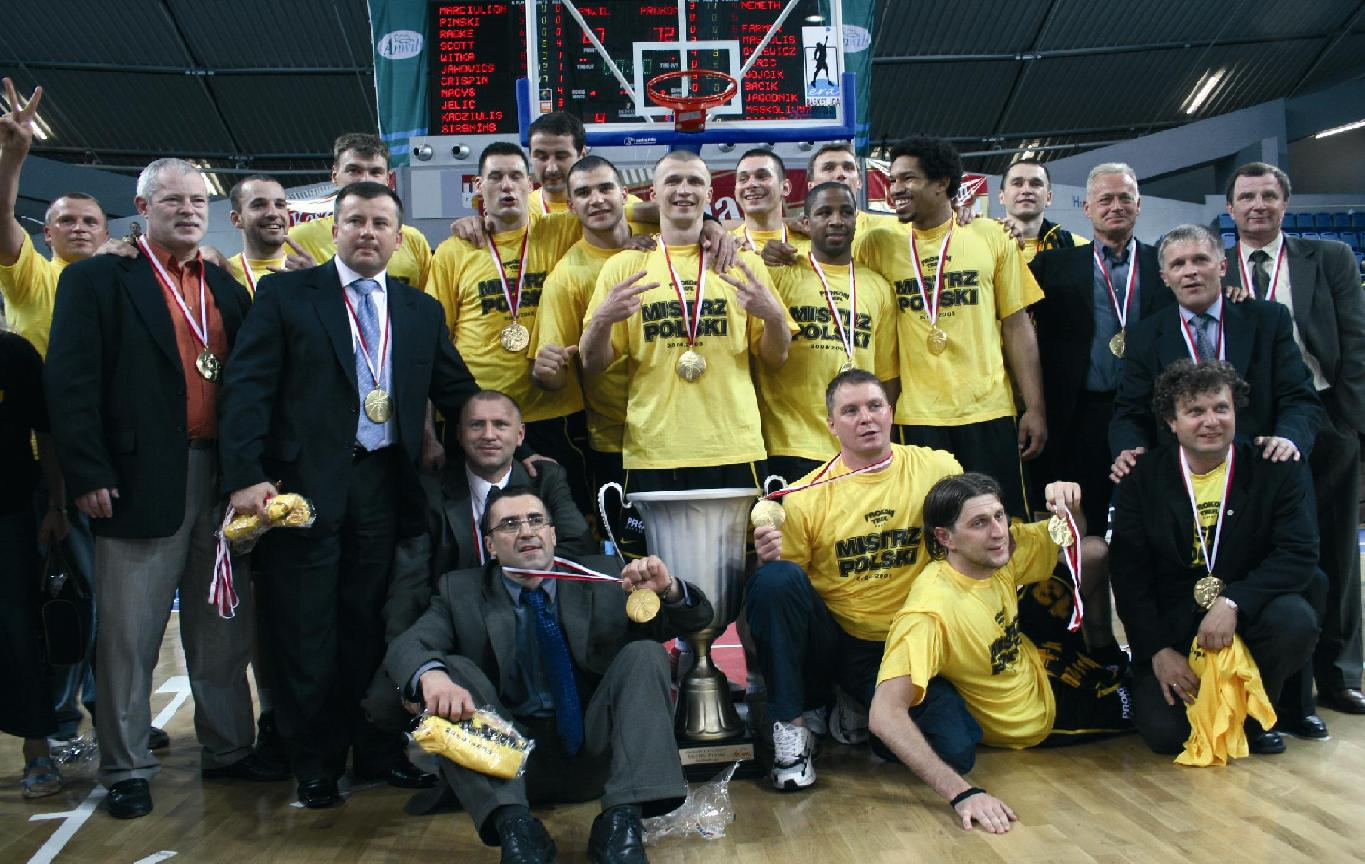 Prokom Trefl Sopot - Mistrz Polski 2005